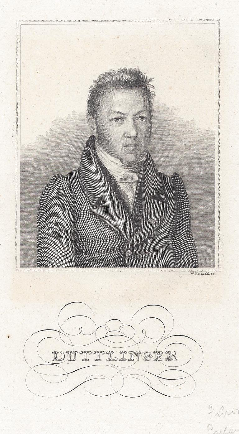 Porträt des Johann Georg Duttlinger von W. Hessloehl